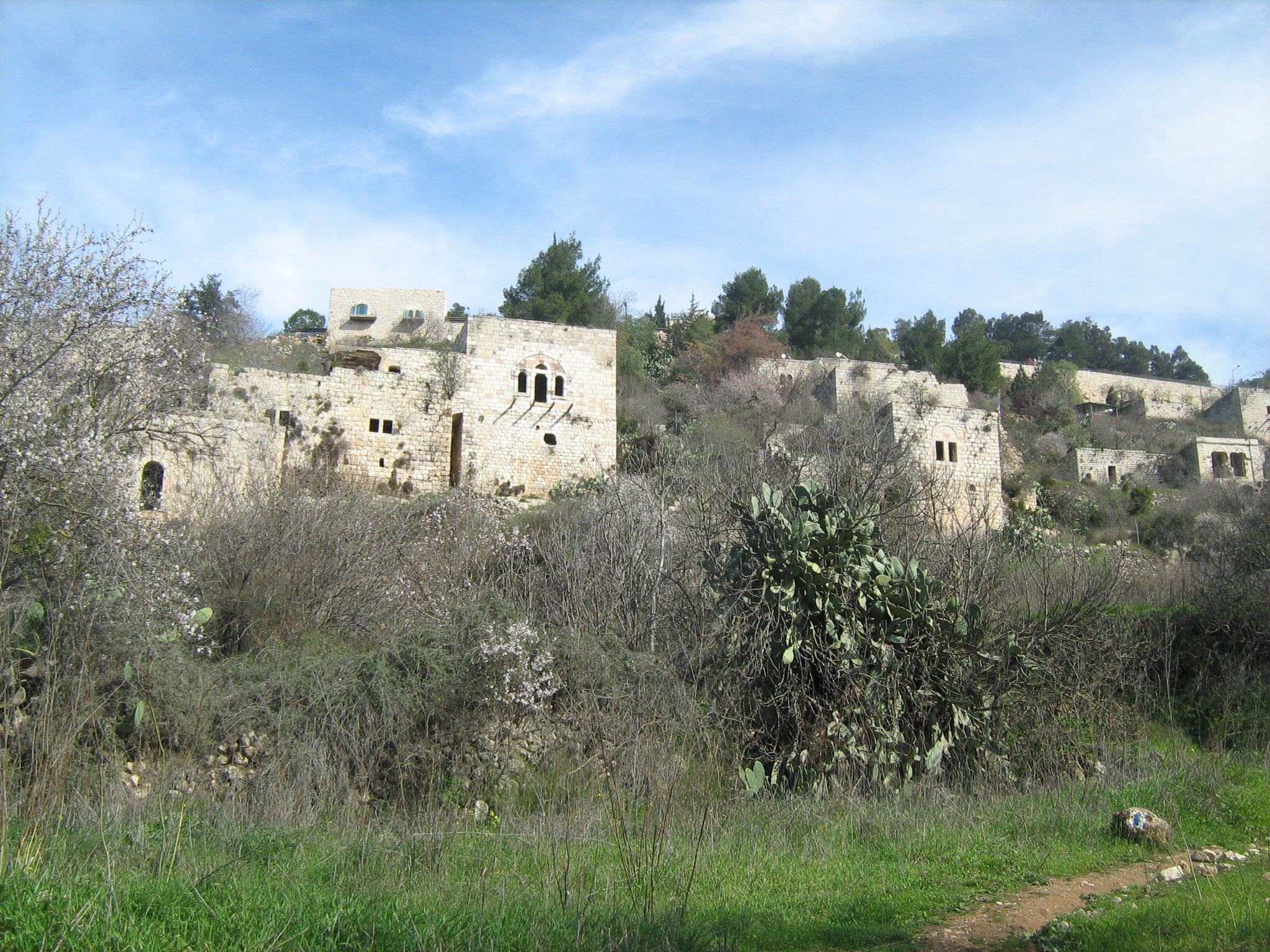 Lifta